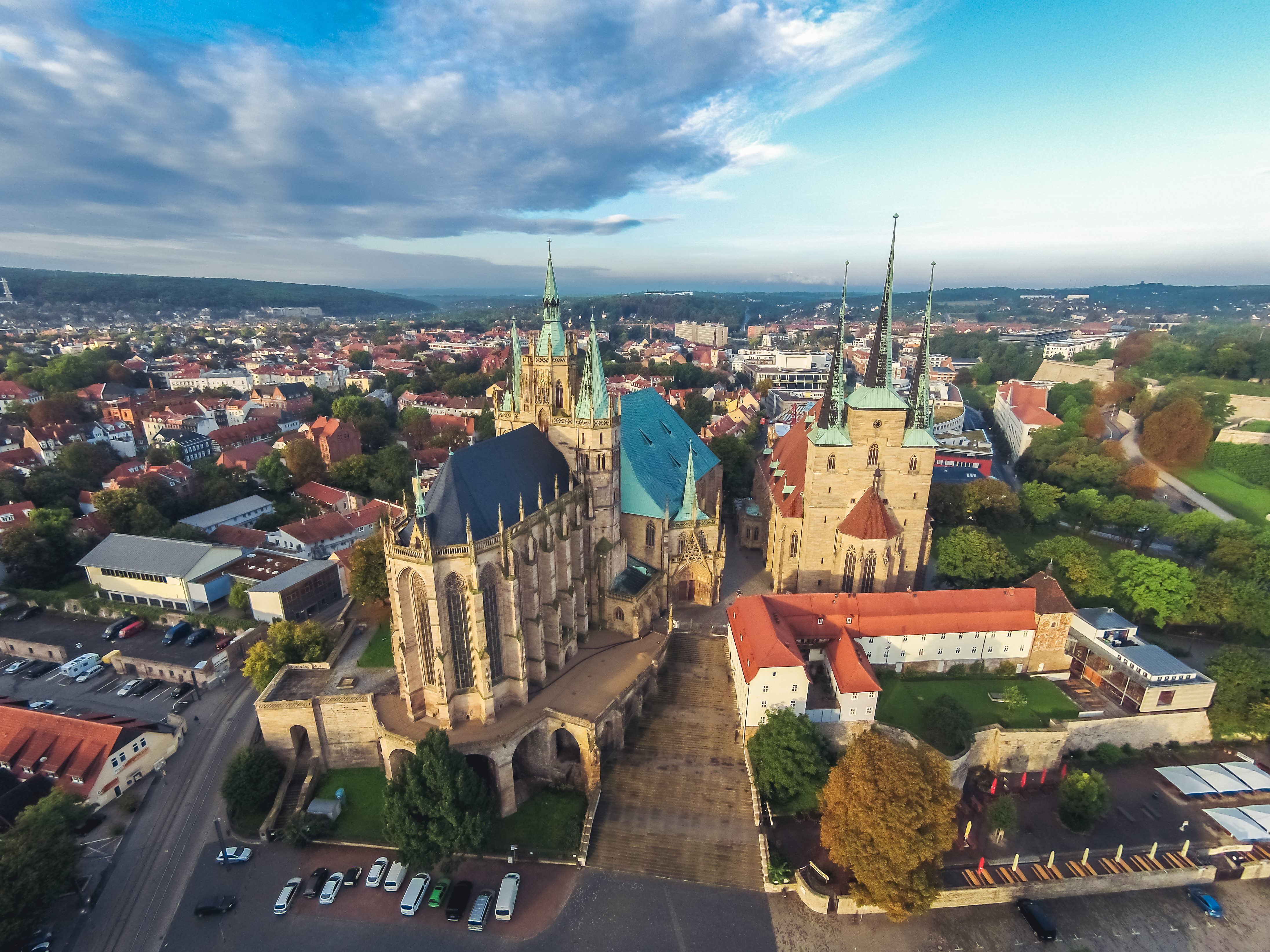 WLM-Fototour Erfurt 2014 Dieses Foto wurde im Rahmen der WLM-Fototour 2014 in Erfurt erstellt, die vom 29. bis 31. August 2014 zum Auftakt des Wettbewerbs Wiki Loves Monuments 2014 statt fand. The making of this document was supported by the Community-Budget of Wikimedia Germany. Erfurter Dom